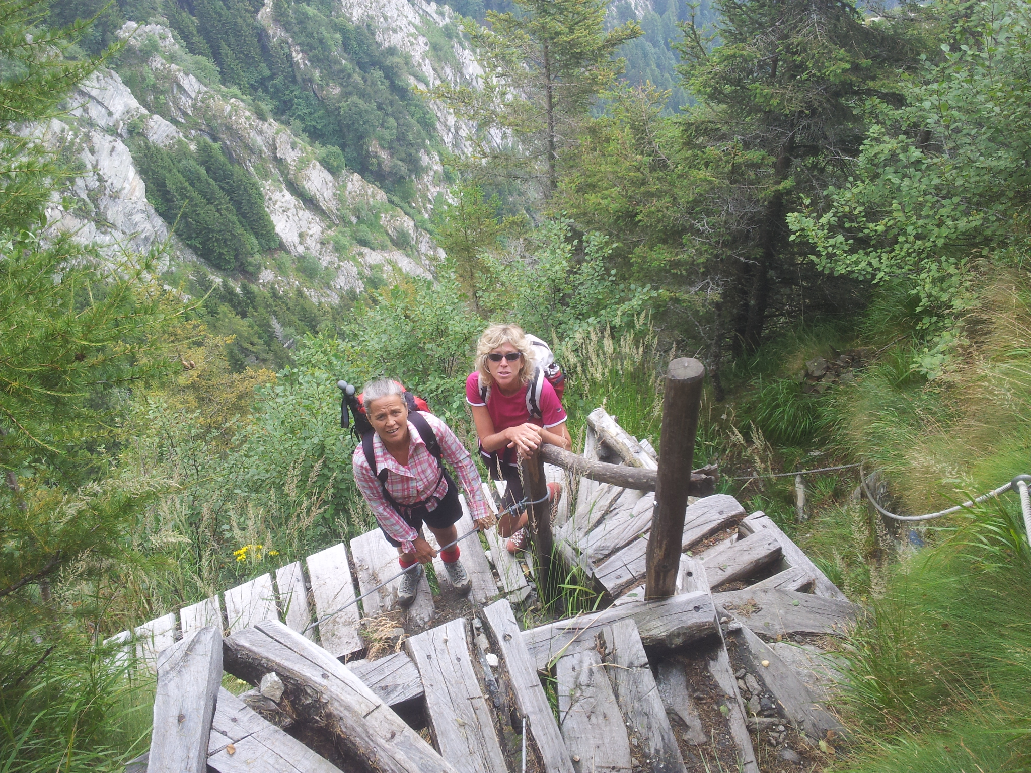 Un ardito sistema di passerelle agevola la salita al Sassariente.